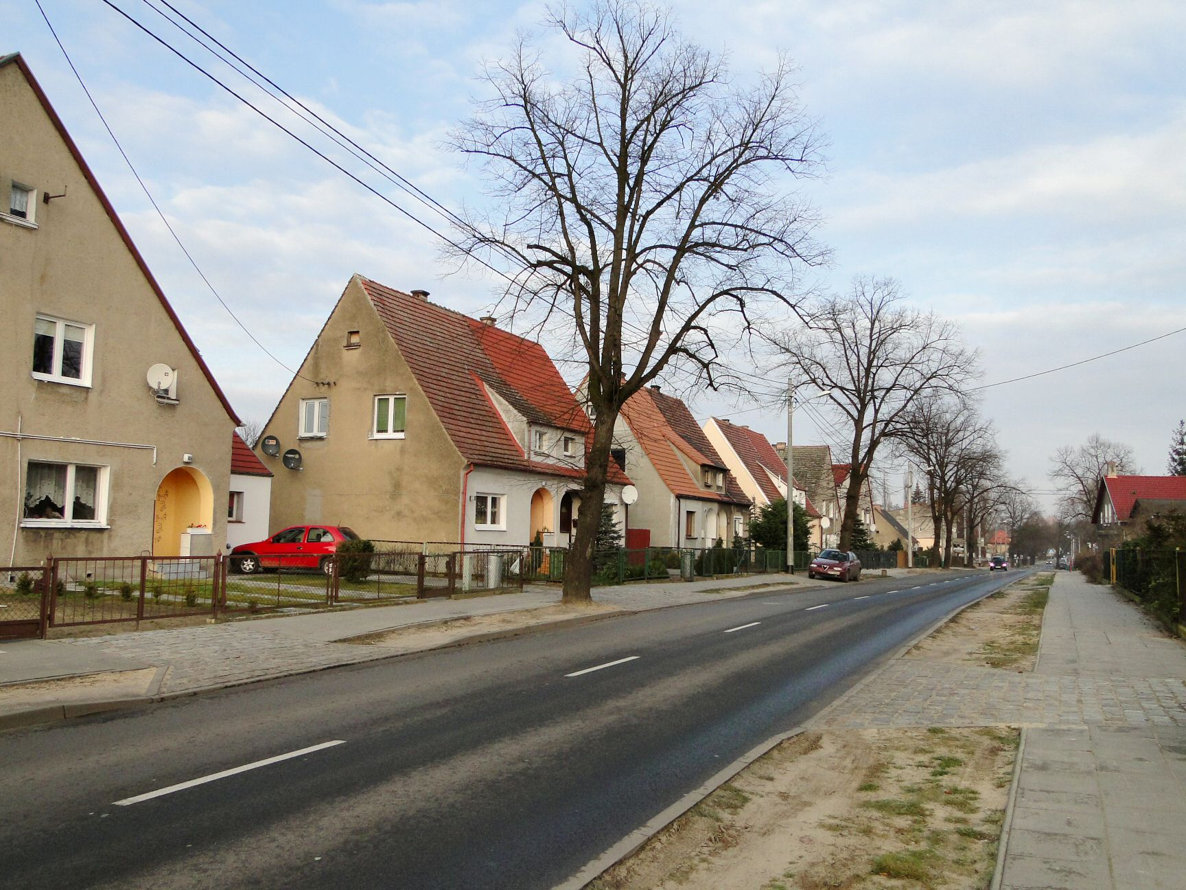 Szczecin Żydowce ul. Przodowników Pracy